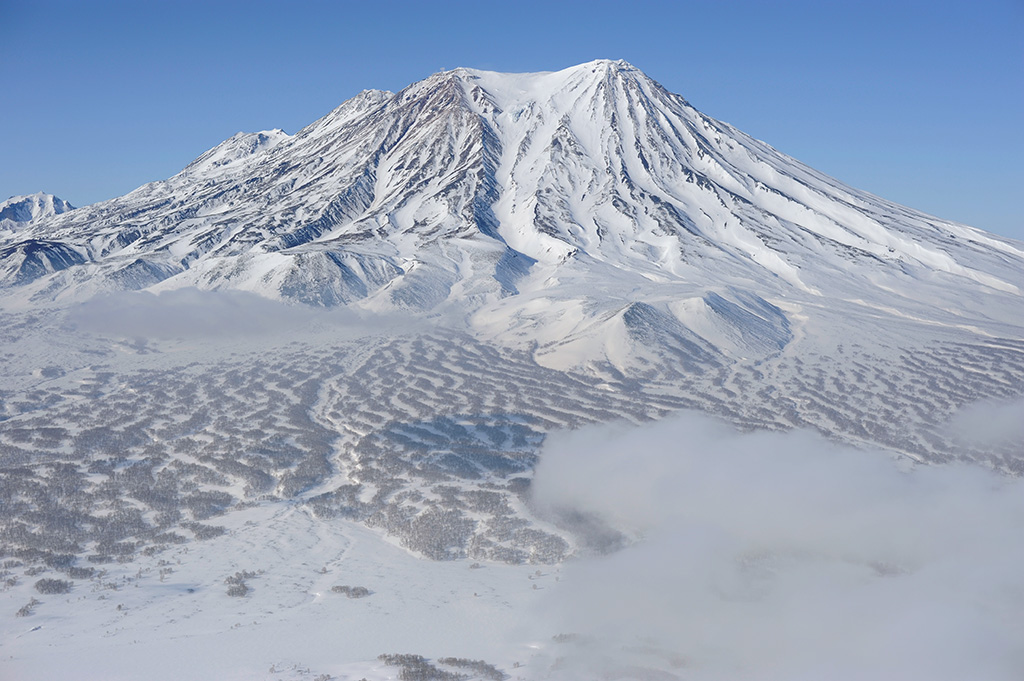 Жупановский вулкан